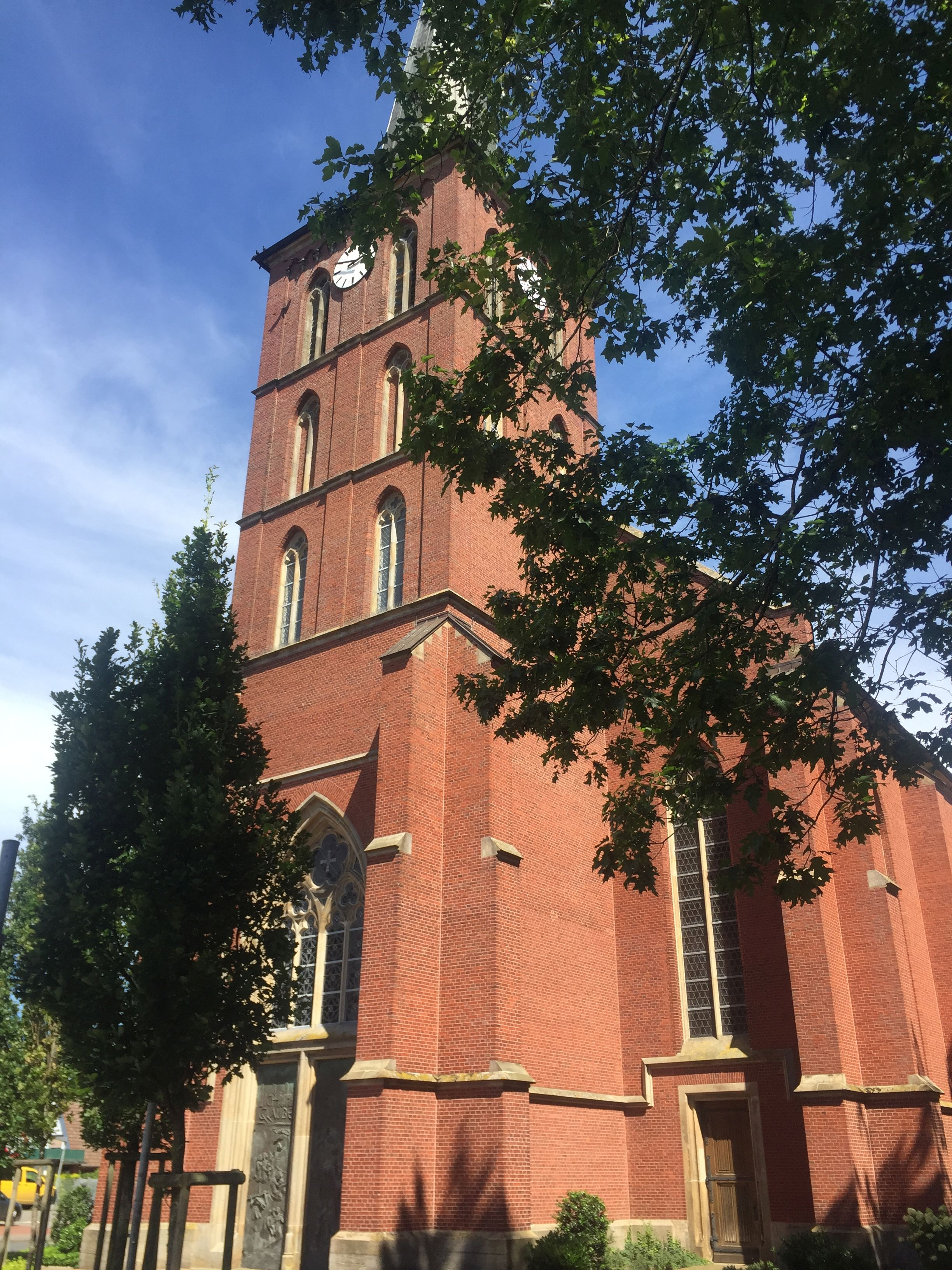 katholische Pfarrkirche in Lastrup